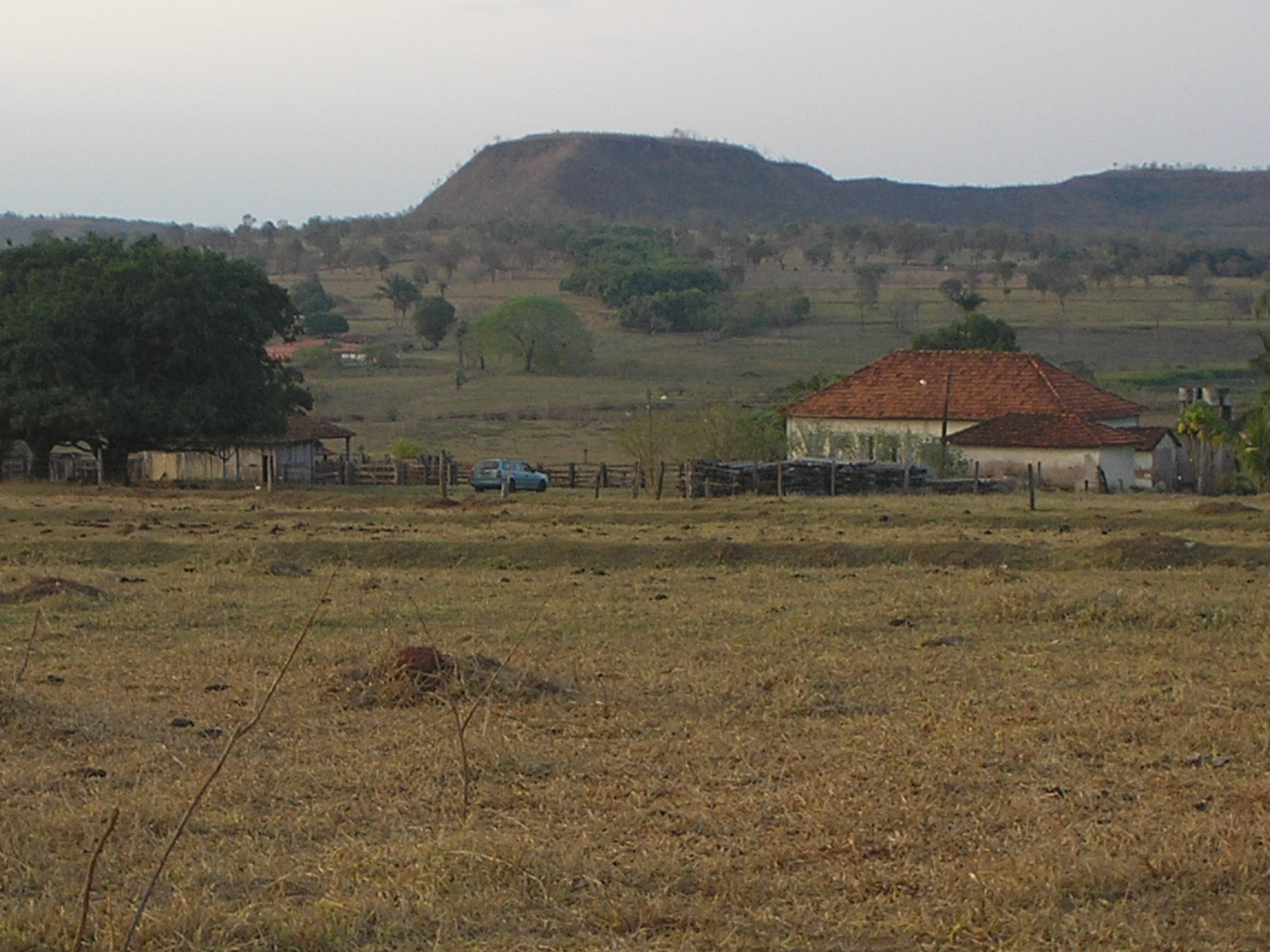 Fazenda na região da Boa Vista.